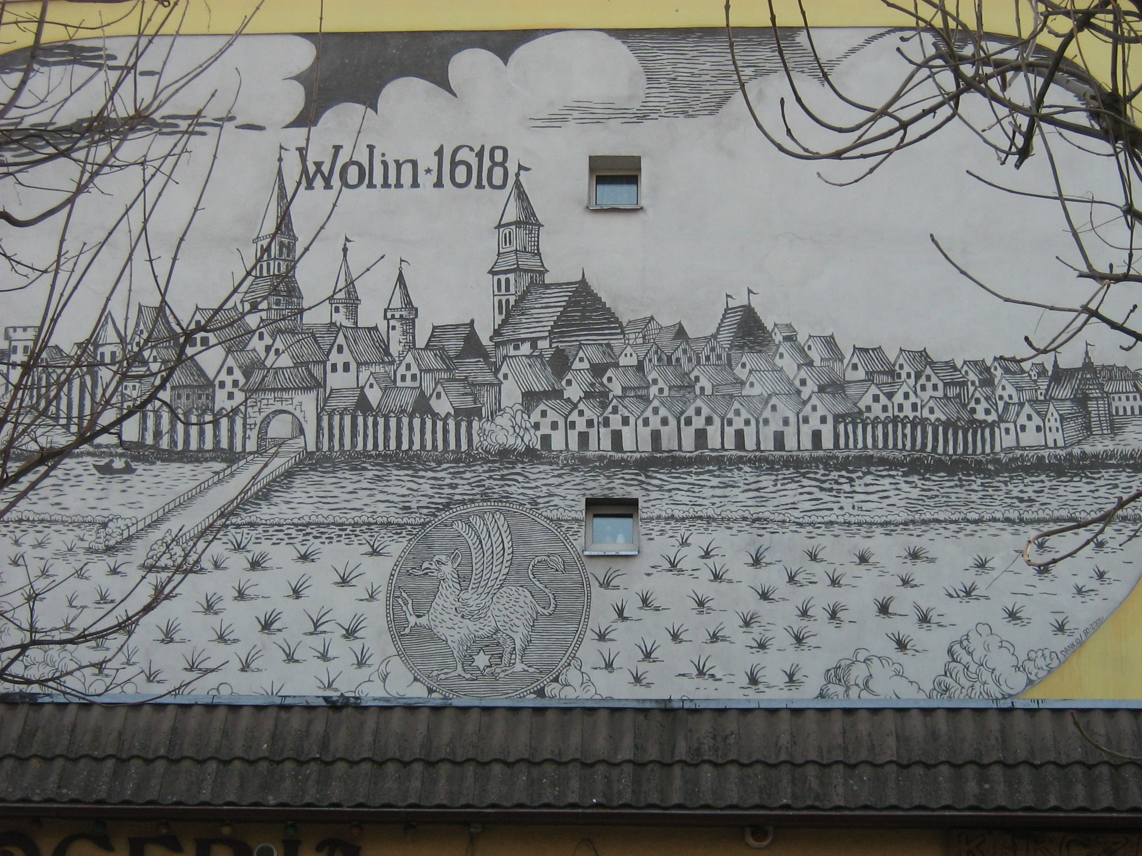 Wolin w roku 1618. Wizerunek jest na jednym z bloków mieszkalnych w centrum miasta.